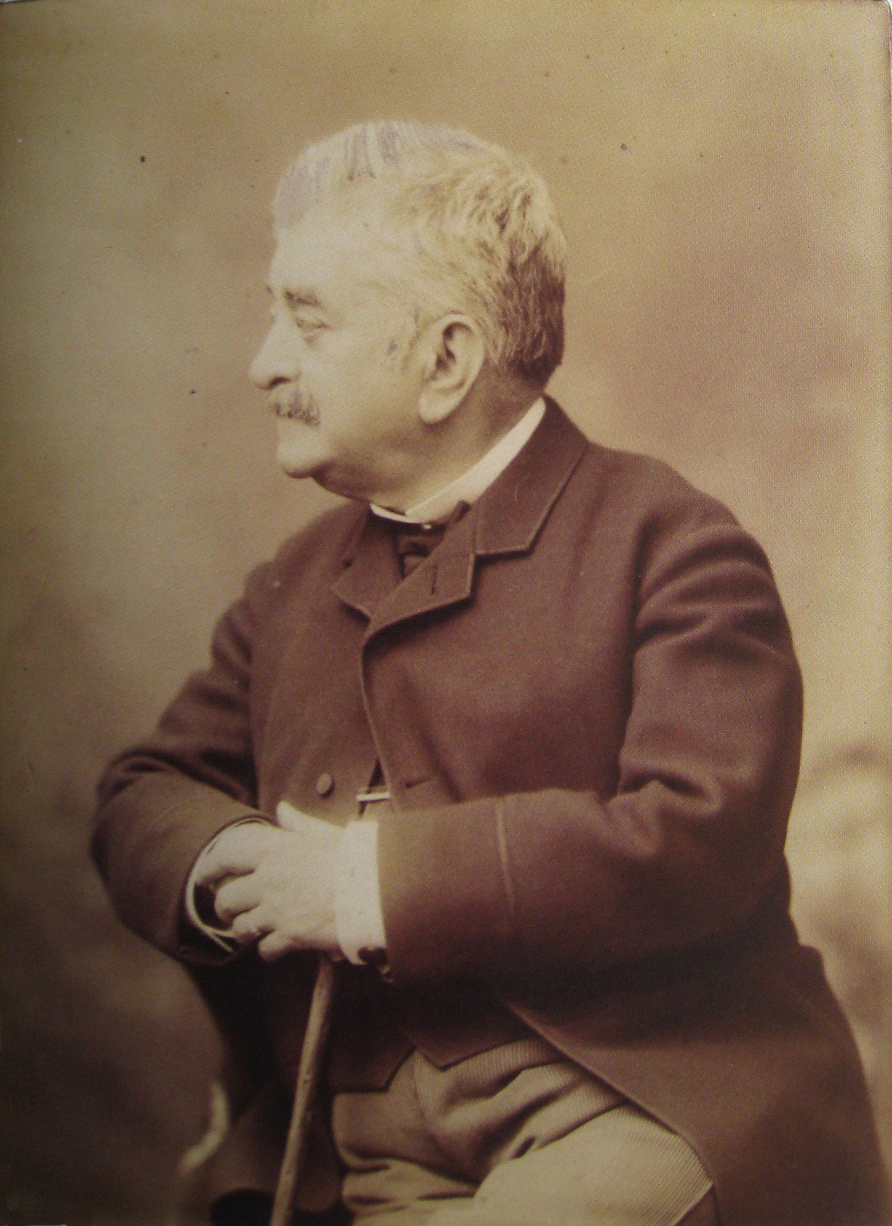 Retrat d'Evarist Arnús i de Ferrer (Barcelona, 1820 — 1890), banquer. Obra dels Fotògrafs Napoleon de 1886.